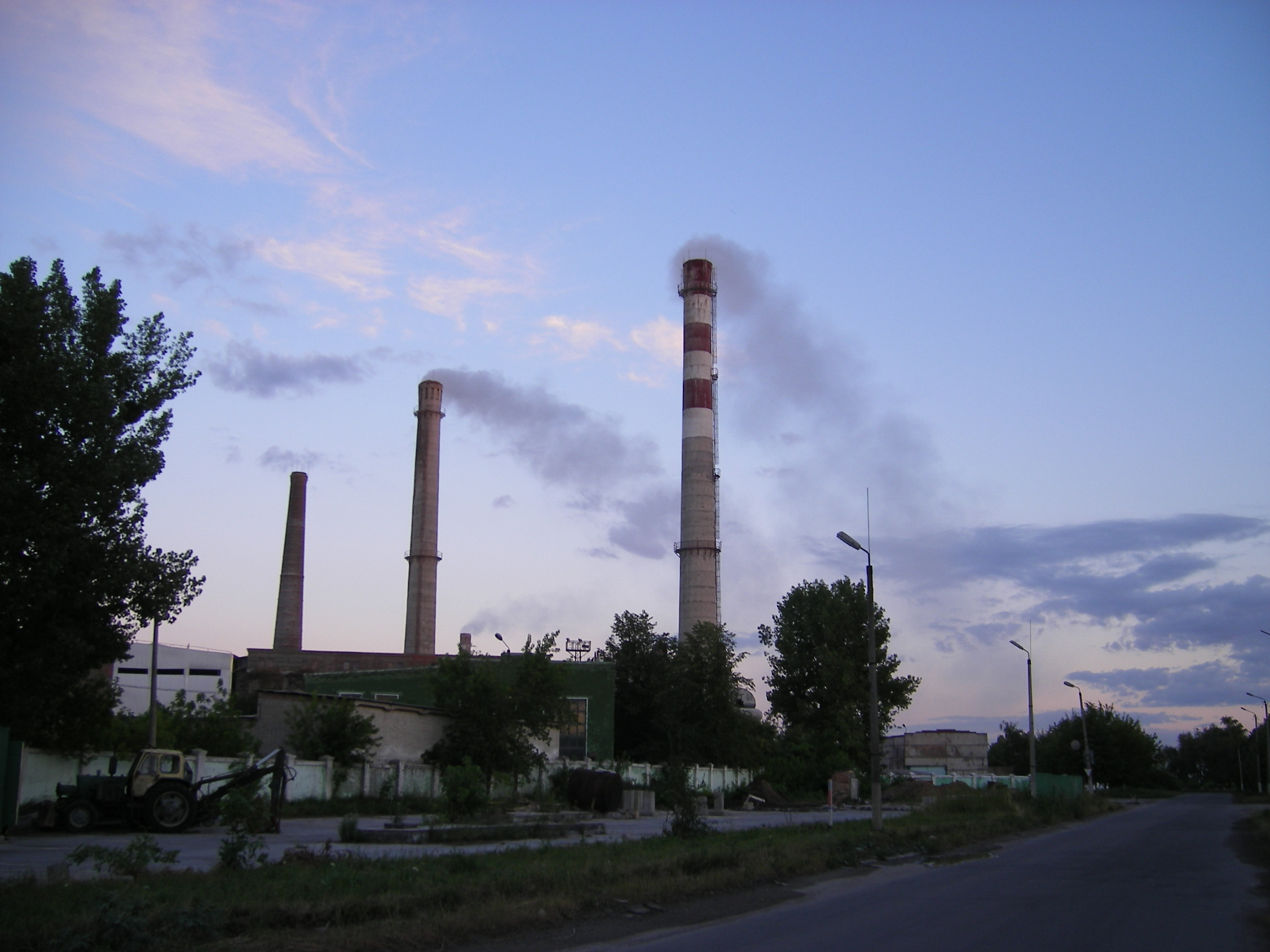 Zdolbuniv cement factory